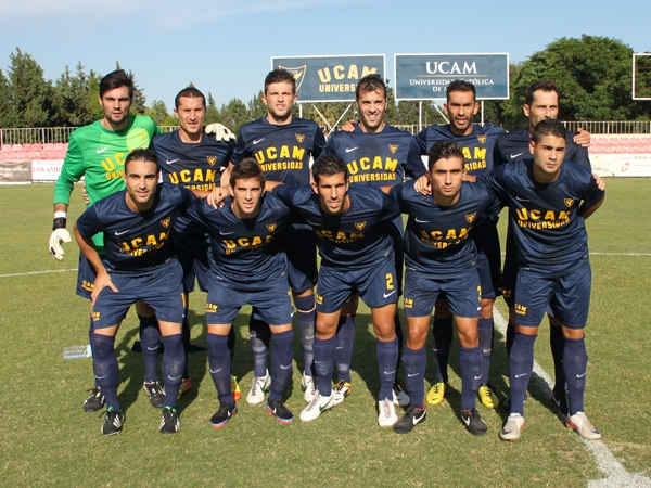 UCAM CF